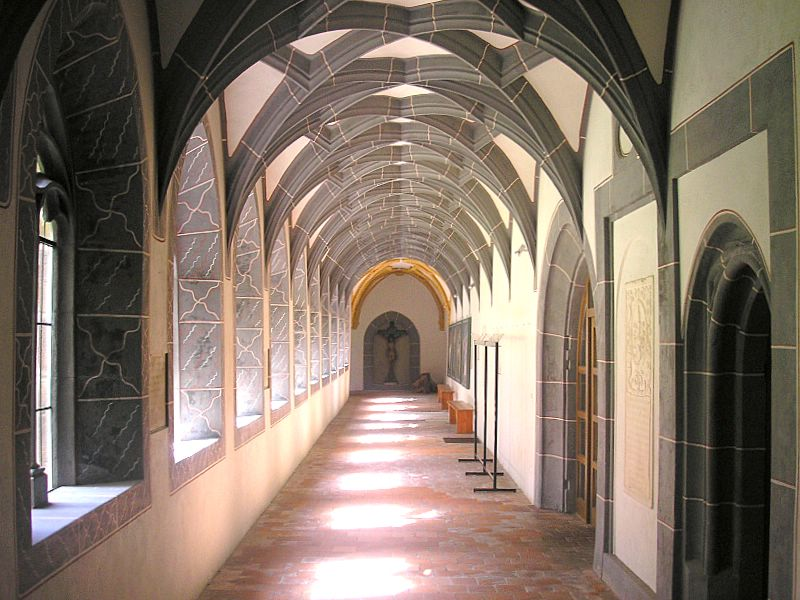 Ehemalige Stiftskirche St. Vitus (Ellwangen a.d. Jagst, BW). Der Kreuzgang. Eigene Aufnahme, Aug. 2006 / St. Vitus, Ellwangen a.d. Jagst, Baden-Wuerttemberg, Germany. The cloister. Own photo, Aug. 2006